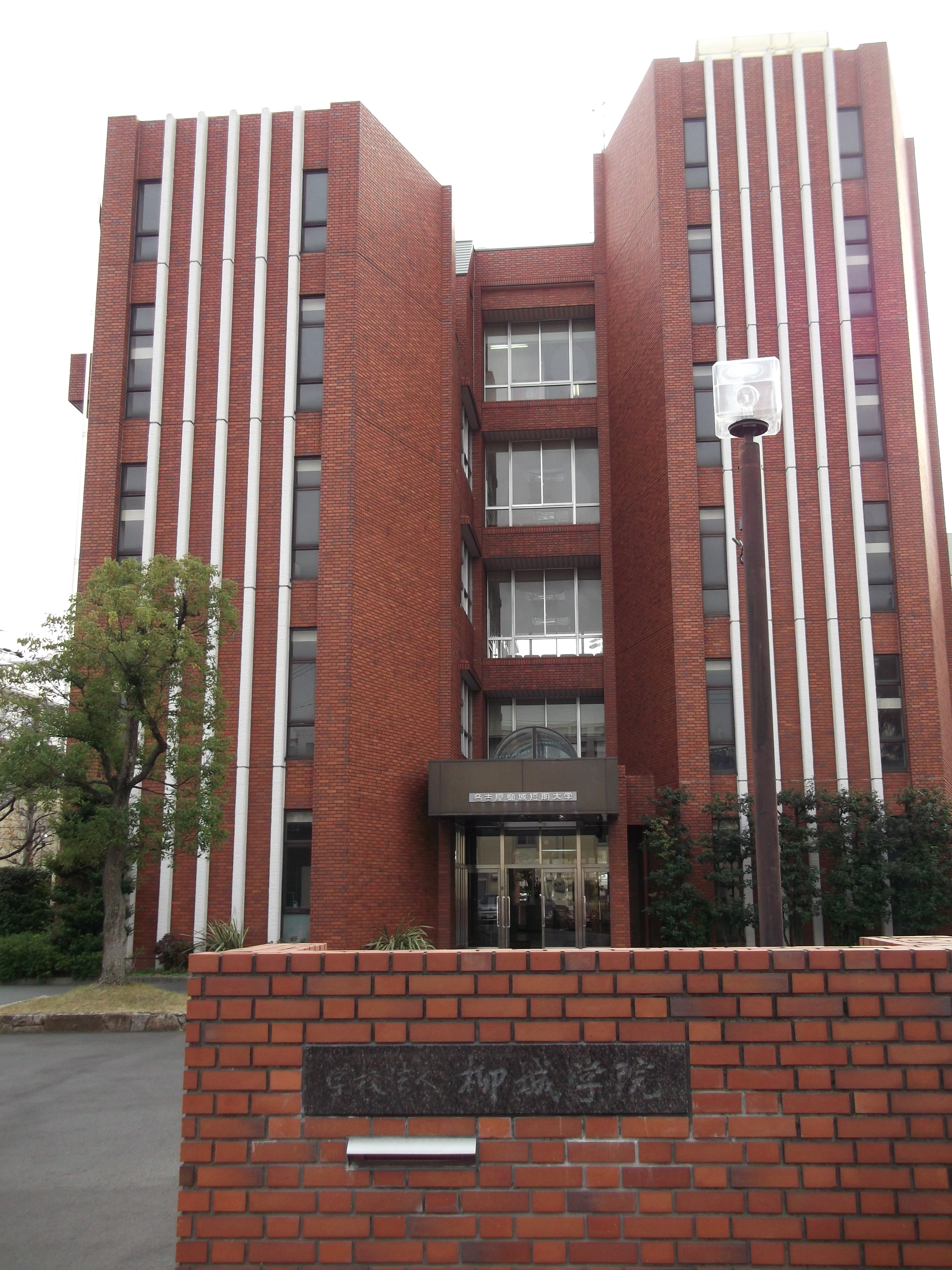 名古屋市昭和区明月町の名古屋柳城短期大学を北側から写す